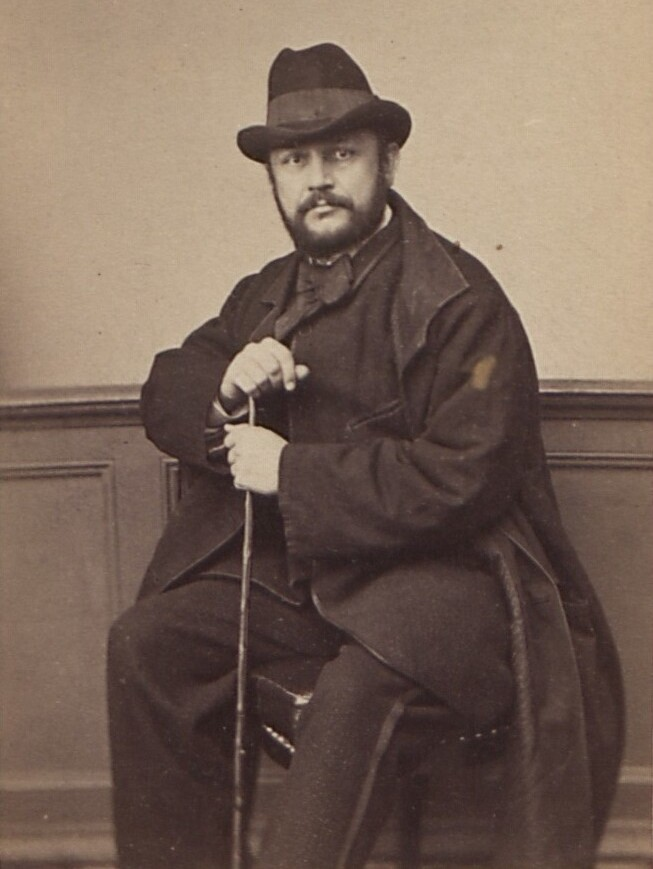 Aleksander Niewiarowski, 1860 r.